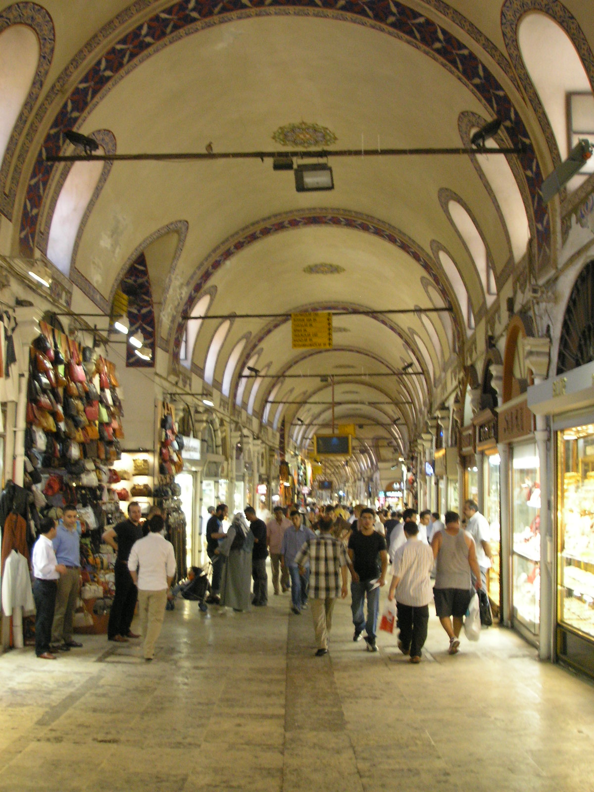 Main way (Kalpakçılar Başı Caddesi) of the Grand Bazaar in Istanbul.